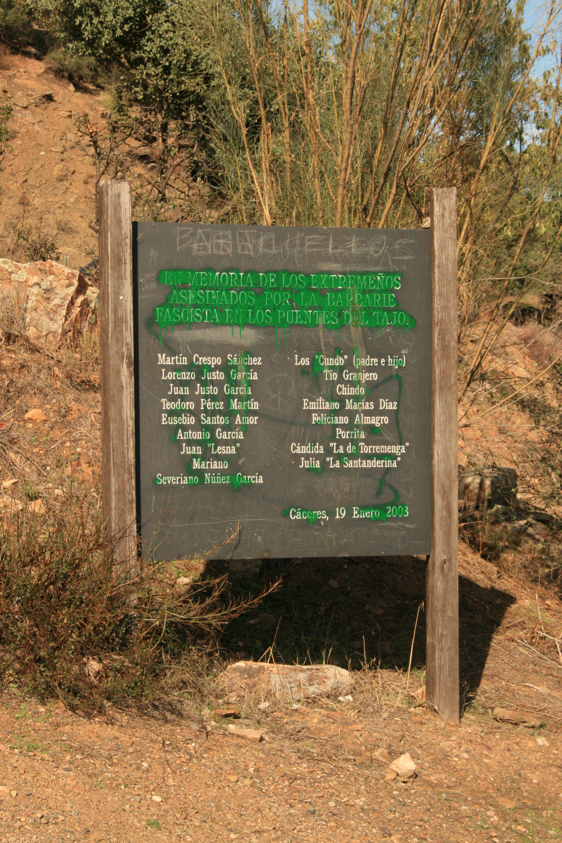 Cartel 'En memoria de los extremeños asesinados por la barbarie fascista en los puentes del Tajo' vandalizado con pintura verde. Junto al puente del Cardenal